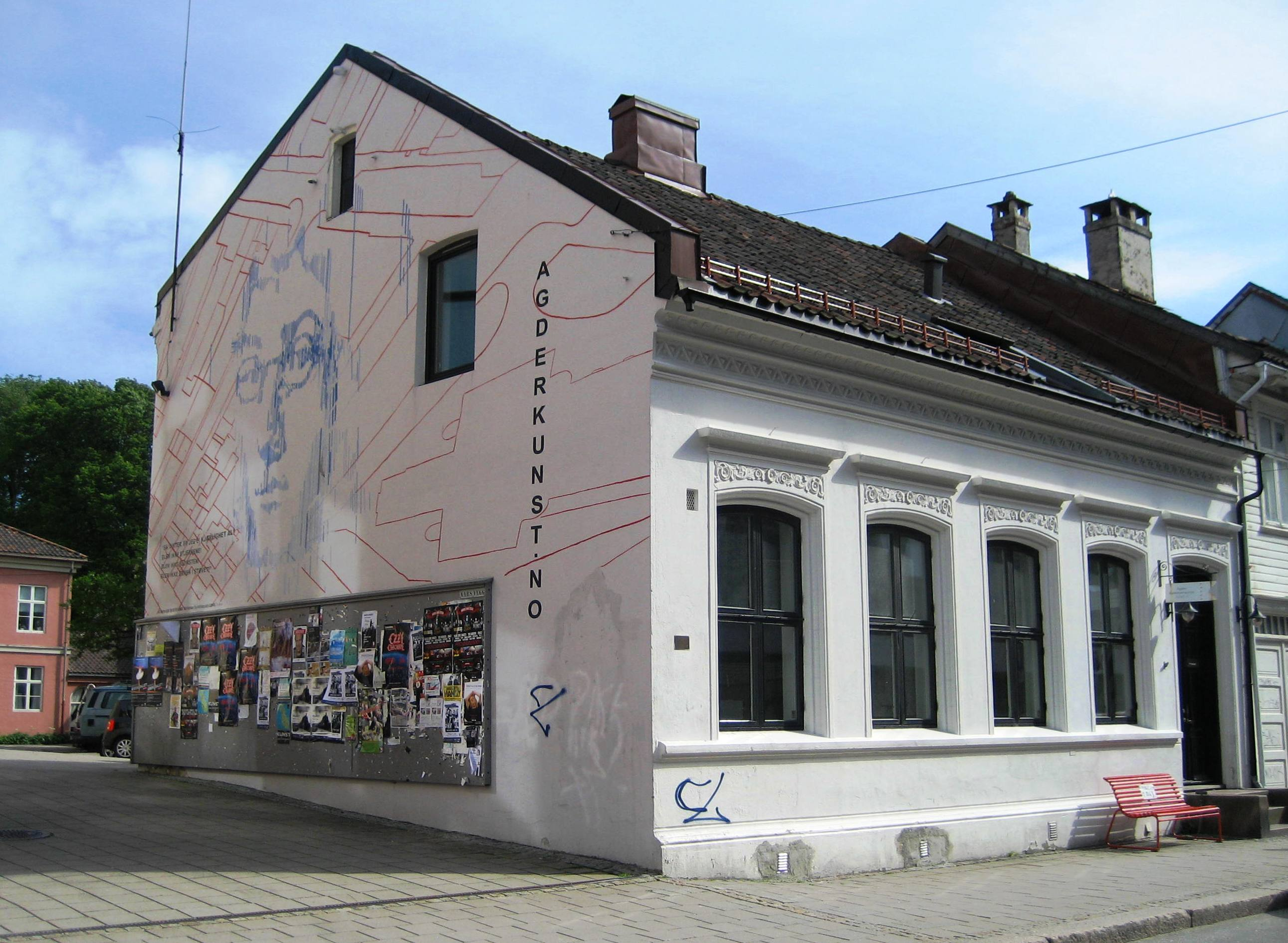 Agder Kunstsenter har sine lokaler i den gamle vaktmesterboligen til Kristiansand Katedralskole i Skippergata 24.